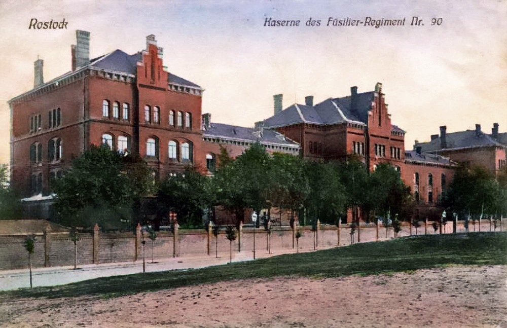 Rostock, Kaserne des Großherzoglich Mecklenburgisches Füsilier-Regiments „Kaiser Wilhelm“ Nr. 90 in der Ulmenstraße